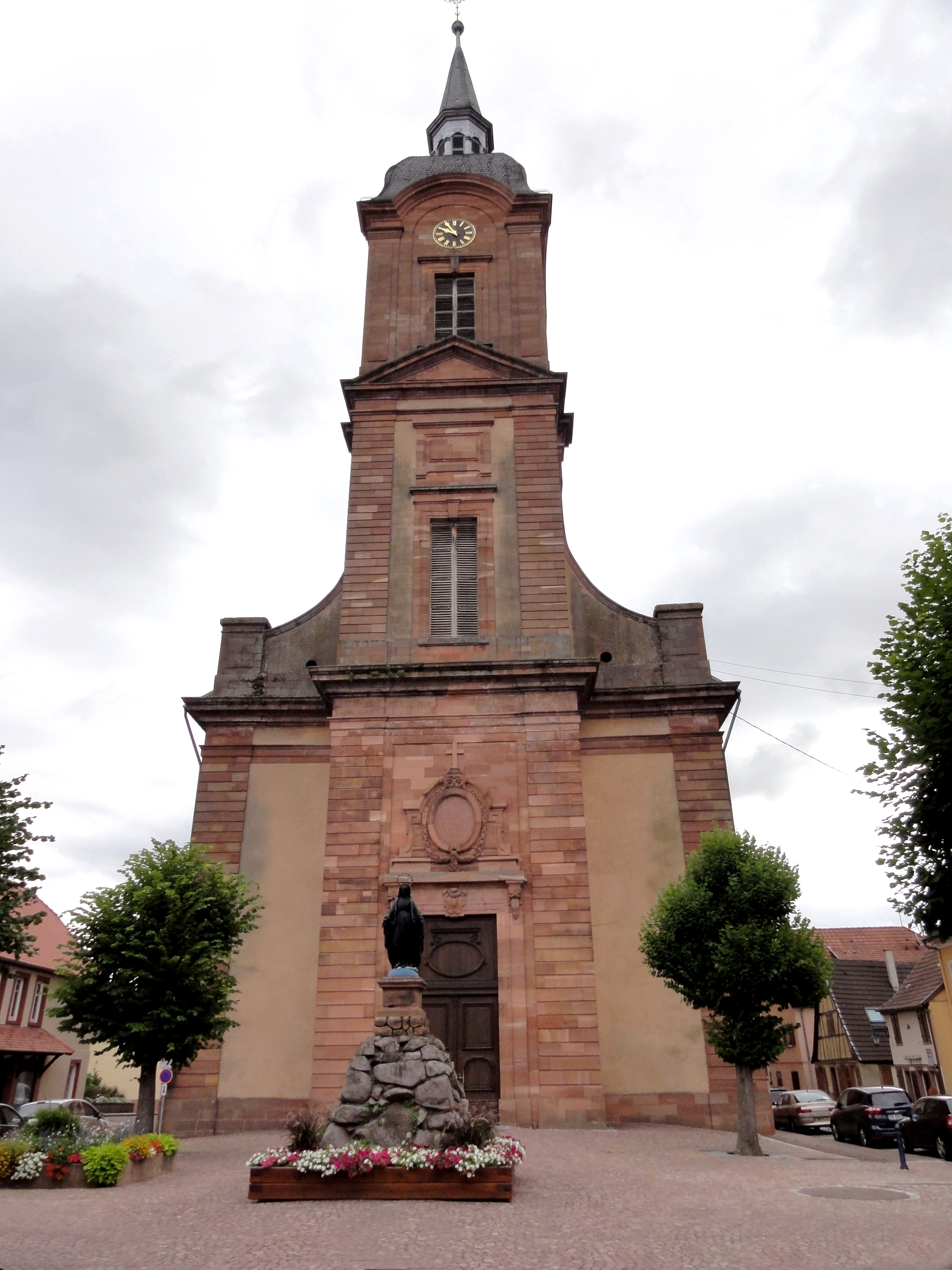 Alsace, Bas-Rhin, Reichshoffen, Église Saint-Michel (PA00084898, IA00123481).